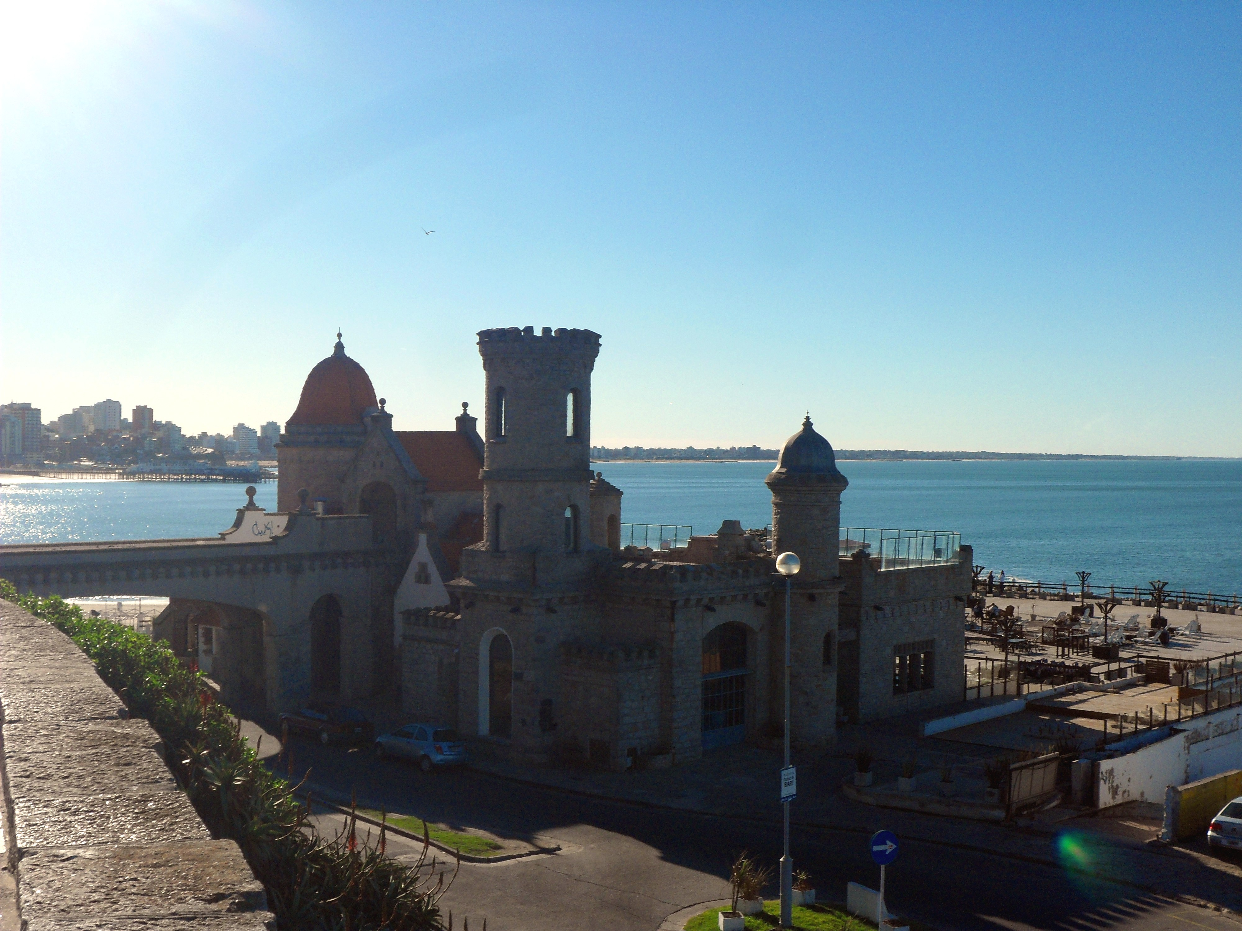 torreon del monje